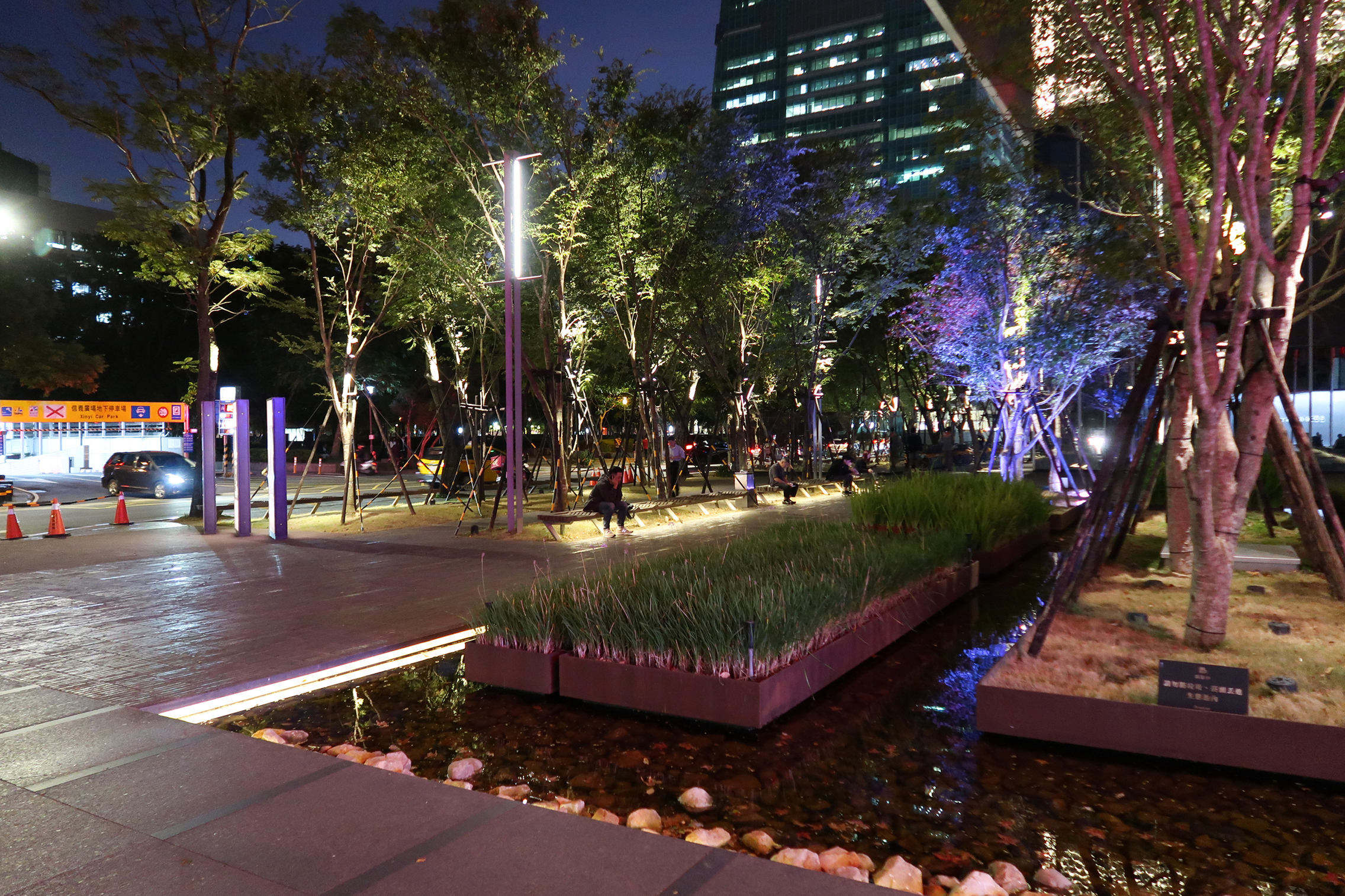 Taipei Nan Shan Plaza